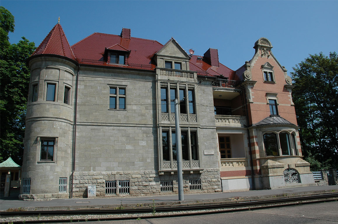 Benary Villa, am Benaryplatz in Erfurt